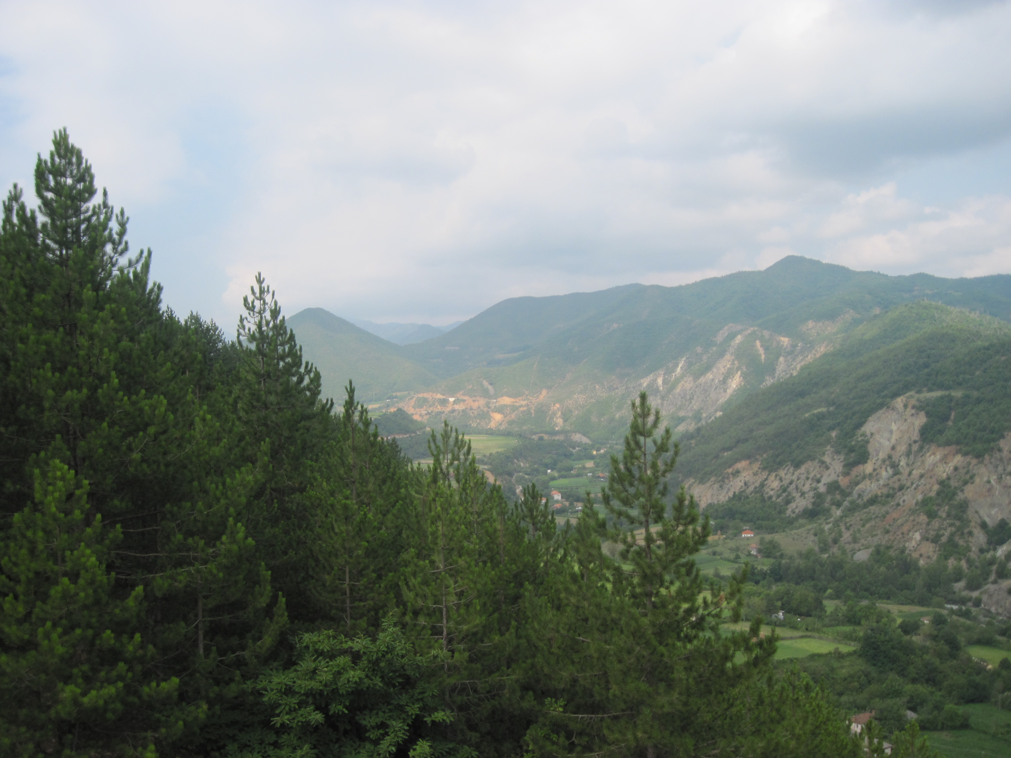 Shënmeri: Bimesia qe gjendet ne male.